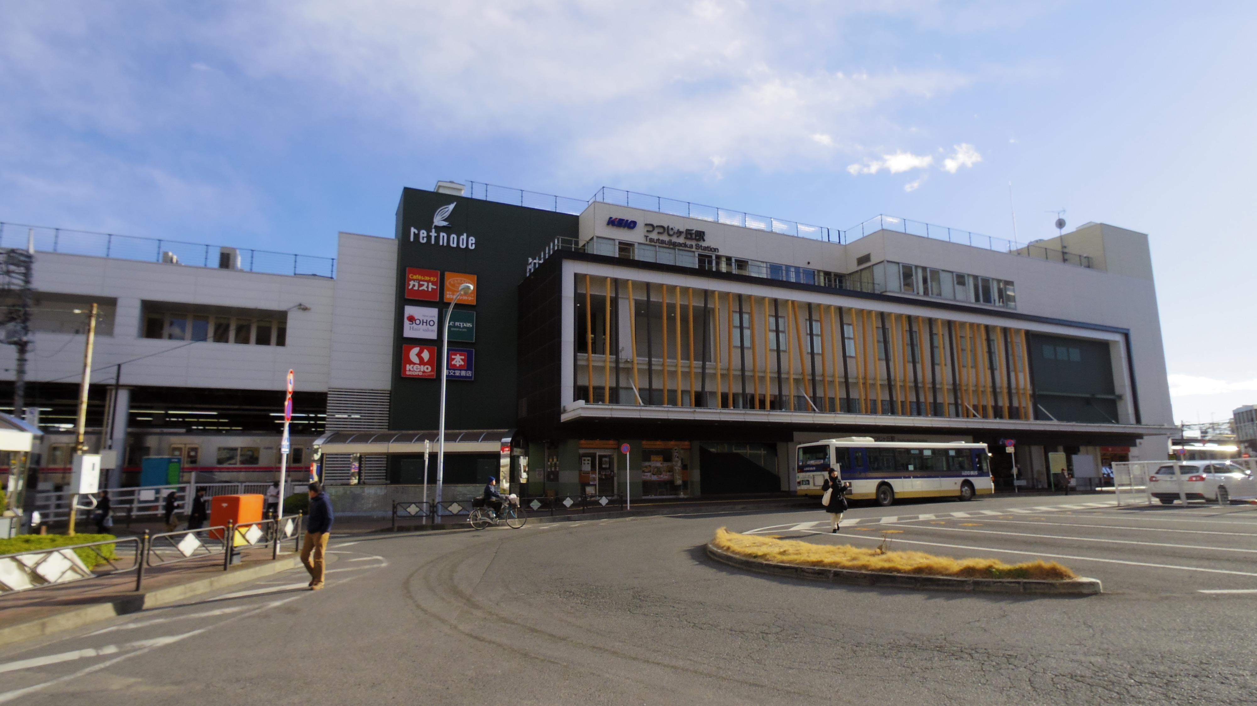 京王線つつじヶ丘駅（2018年2月12日撮影）